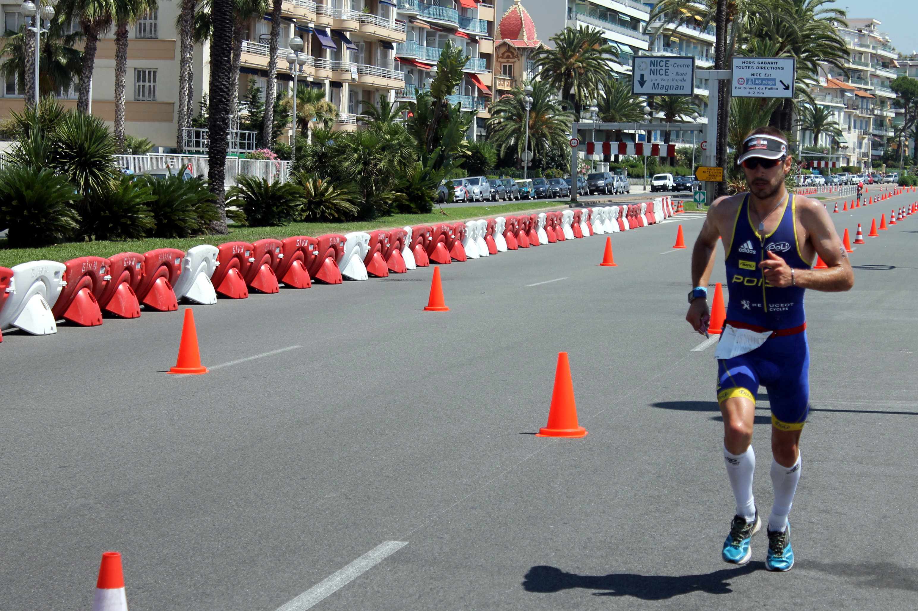 Ironman France . Nice 2015